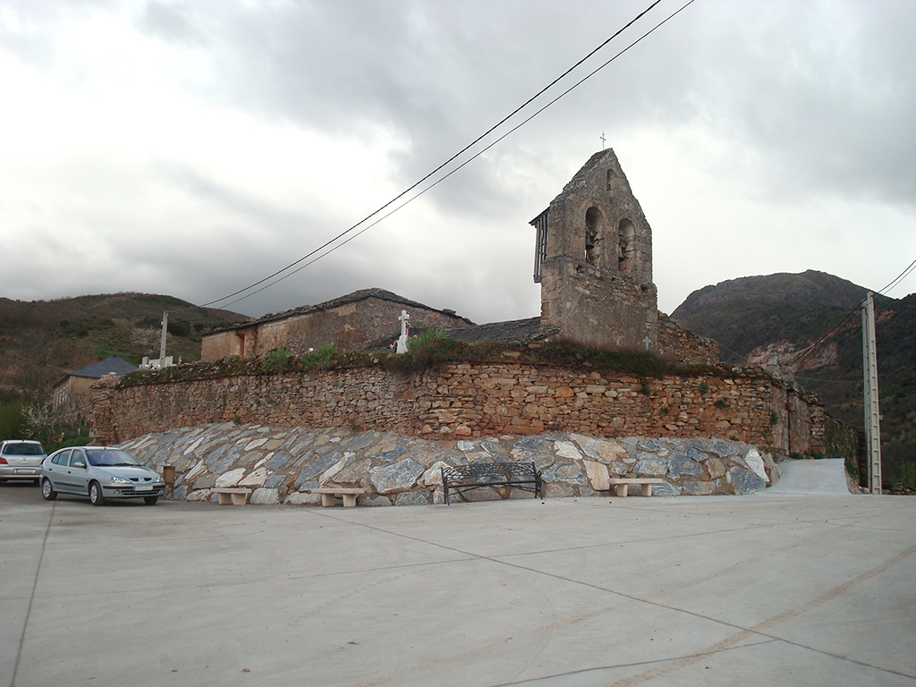 Vista de la Iglesia desde la Plaza de San Miguel